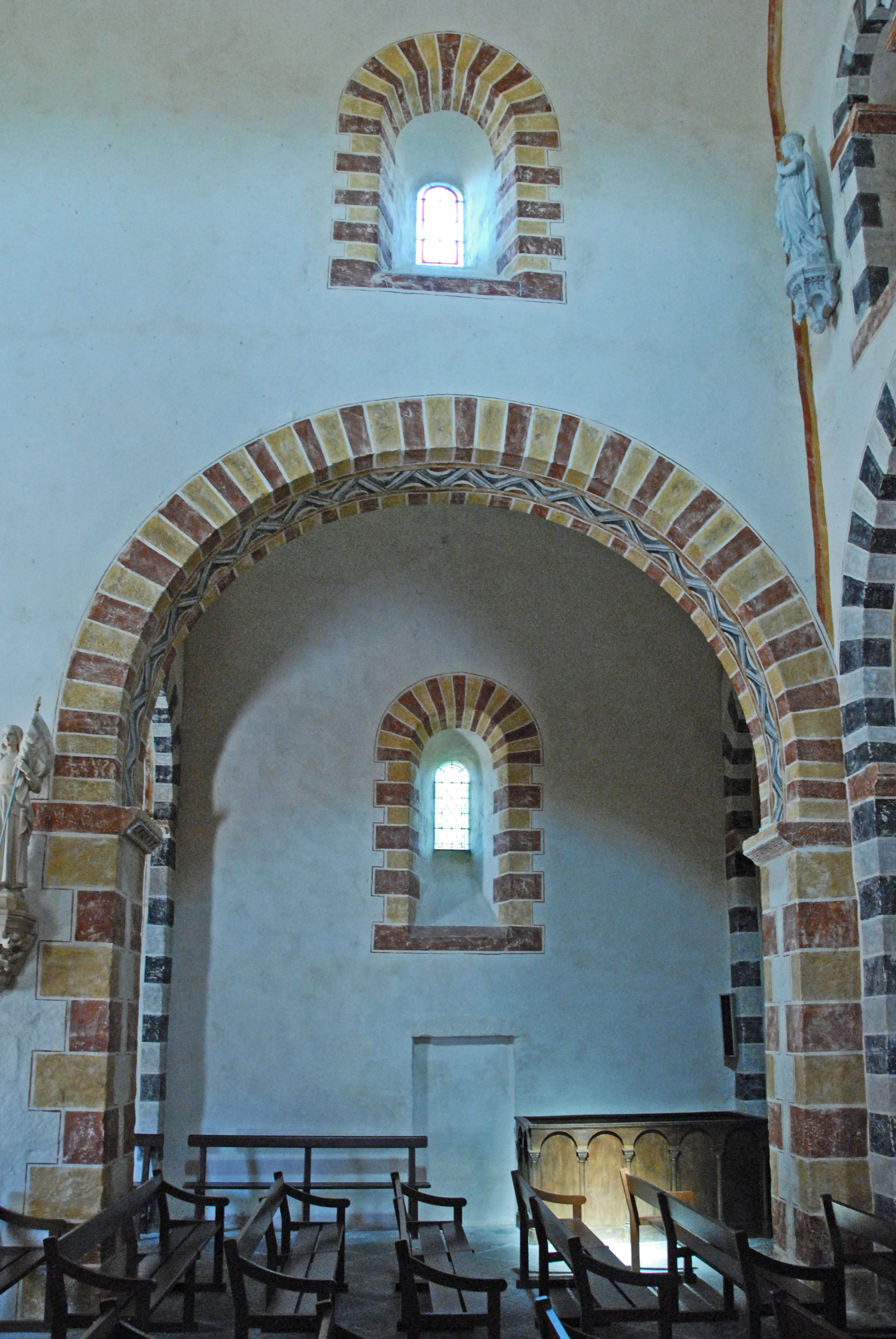 St.-Jean Glaine-Montaigut, Nordwand, Joch 2